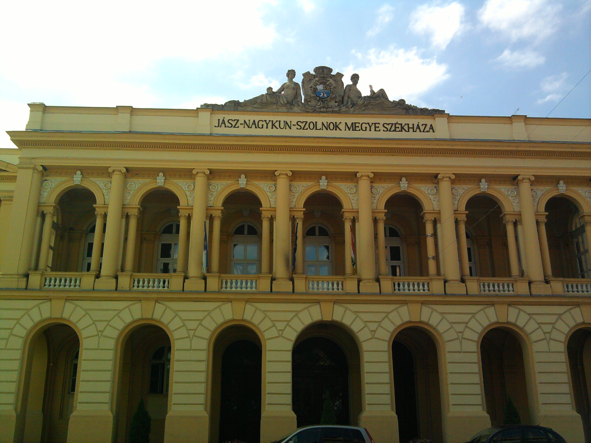 megyeháza This is a photo of a monument in Hungary. Identifier: 6046